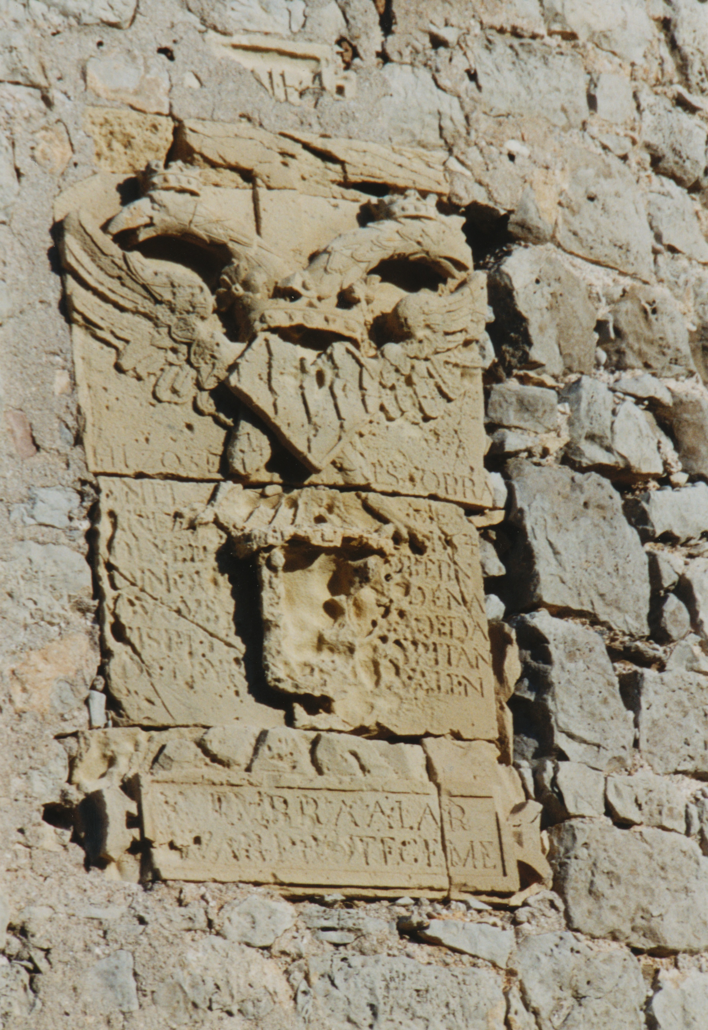 Peníscola - Torre Badum - escut